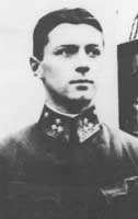 Franz Peter osztrák-magyar első világháborús ászpilóta